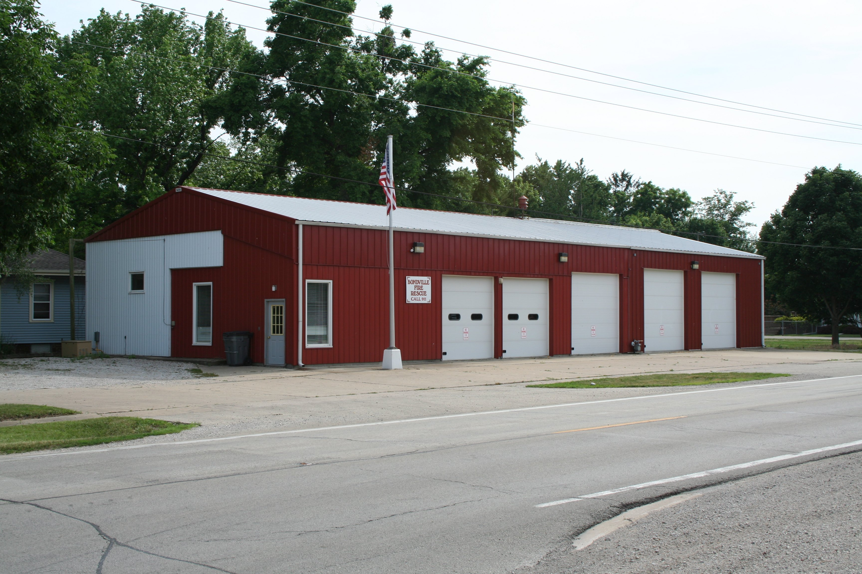 Bondville,Illinois Fire Station